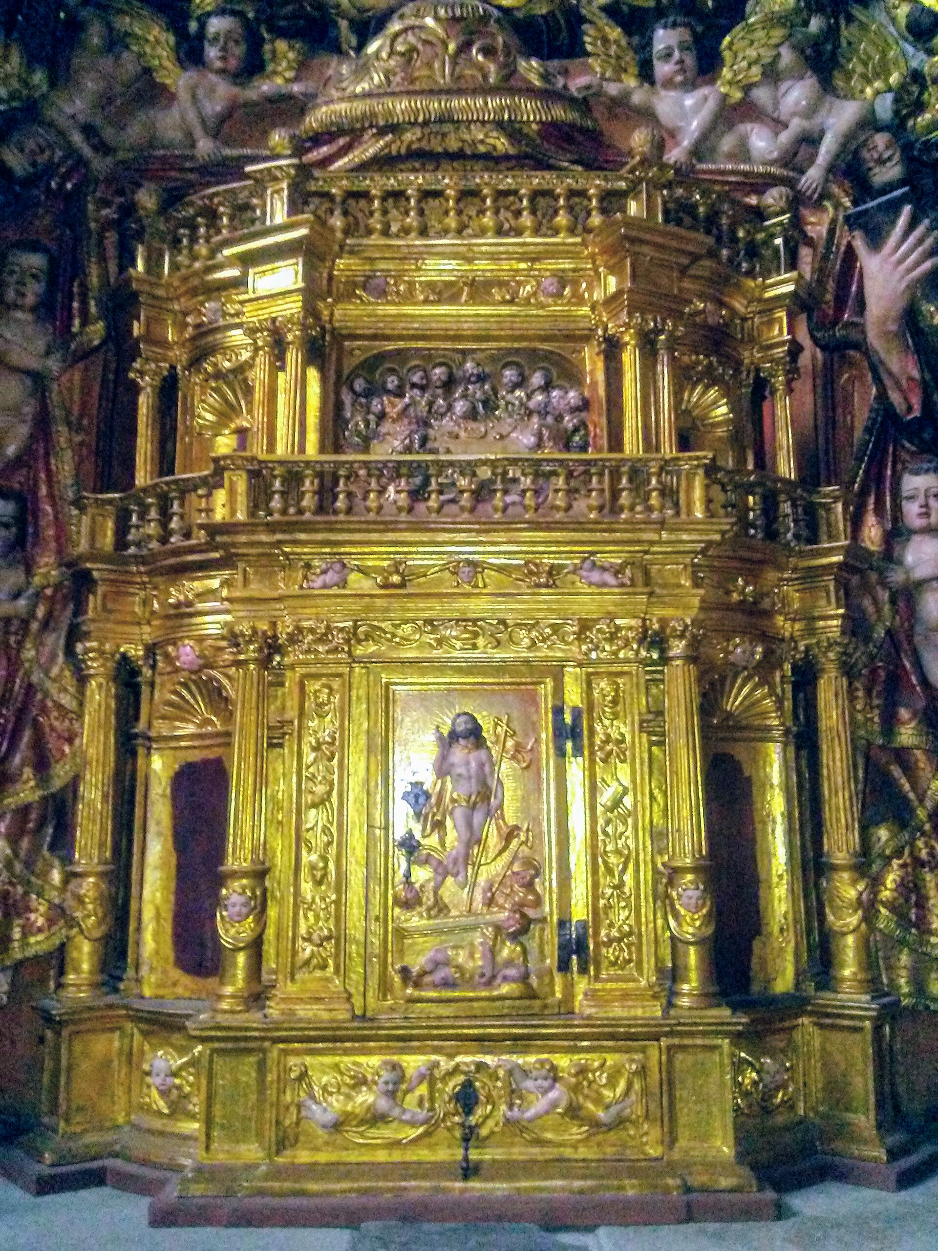 Sagrario retablo San Juan (Catedral Orense)